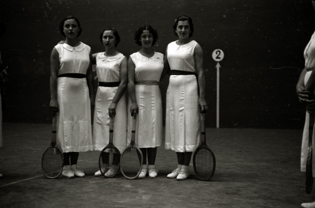 Título original: Grupo de raquetistas posando en un frontón (2/5) Localización: San Sebastián (Guipúzcoa)